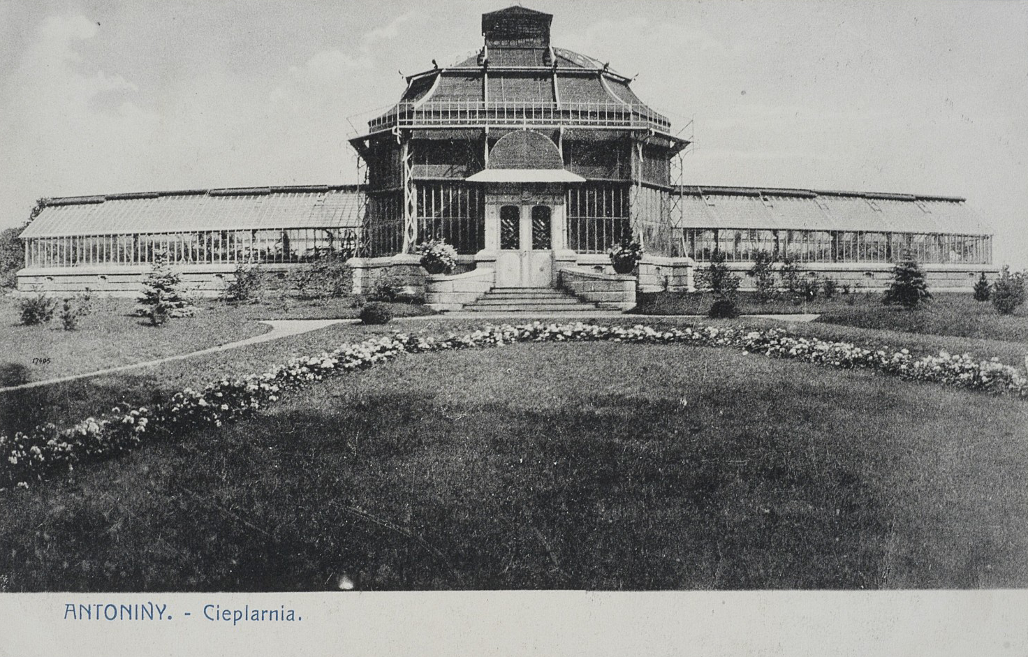 Накладом В. Кжишковського.